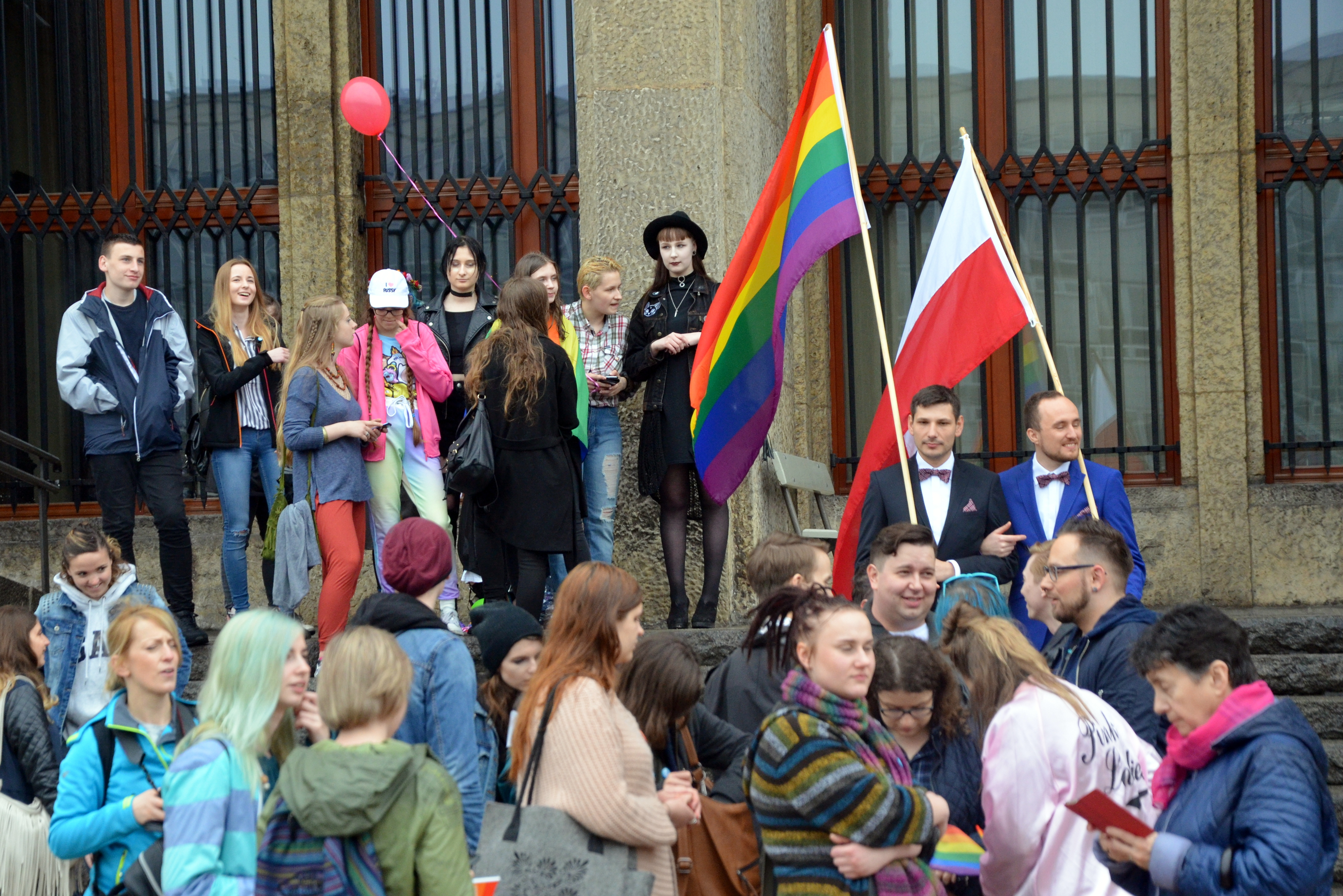 Das Queer Mai Festival, die Kultur der LGBTQI in Krakau